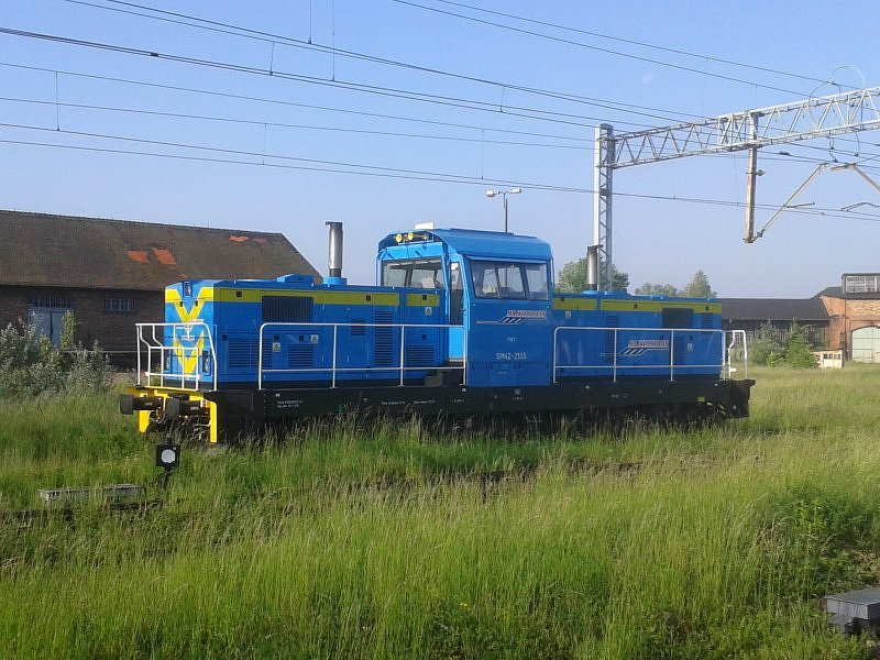 Zmodernizowany spalinowóz SM42-2135 należący do przewoźnika Majkoltrans stoi na stacji w Gnieźnie.